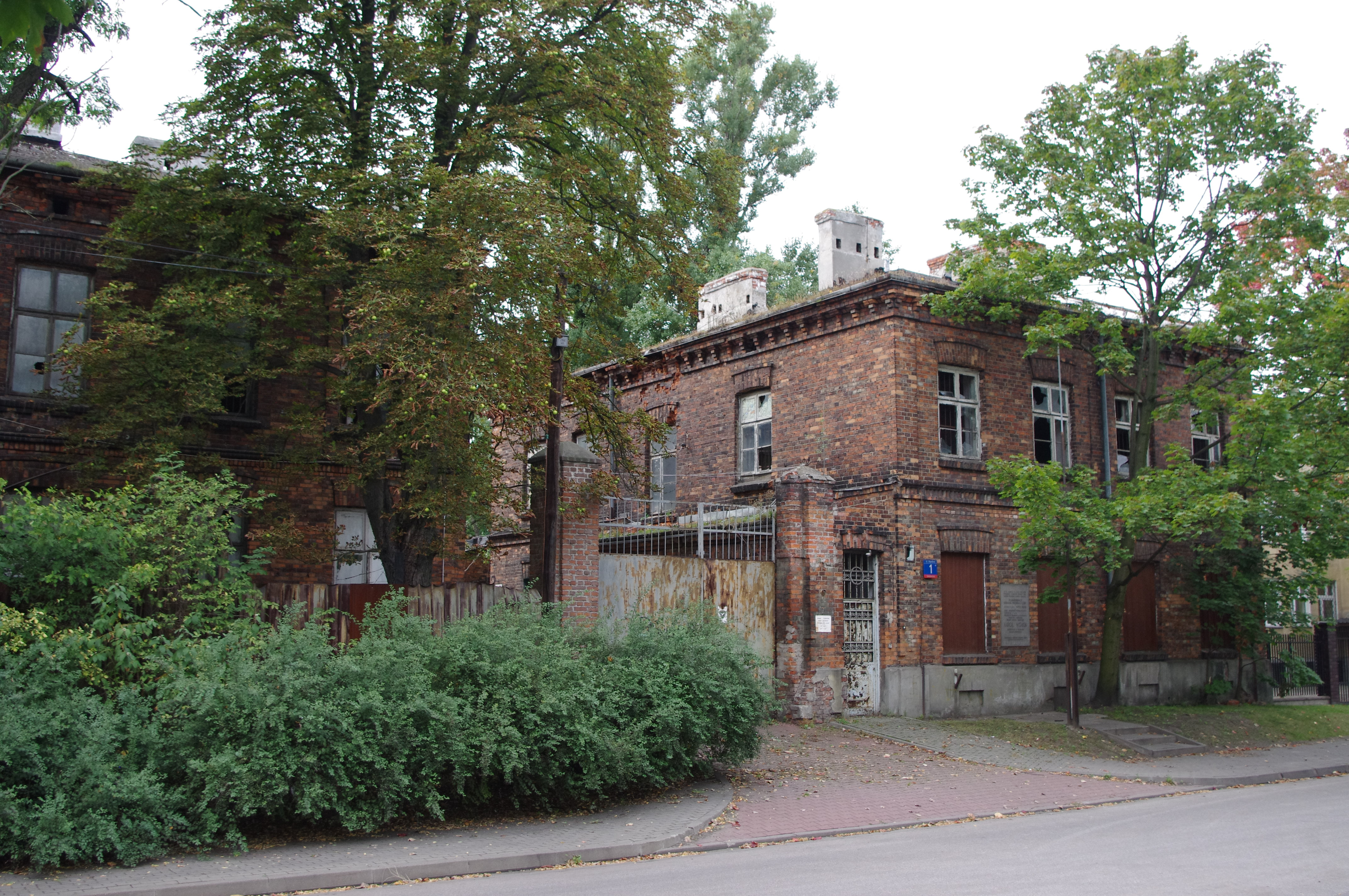 Budynki dawnej Fabryki Drutu im. Karola Wójcika na ul. Objazdowej 1 w Warszawie (wcześniej Belgijska Fabryka Drutu w Warszawie)